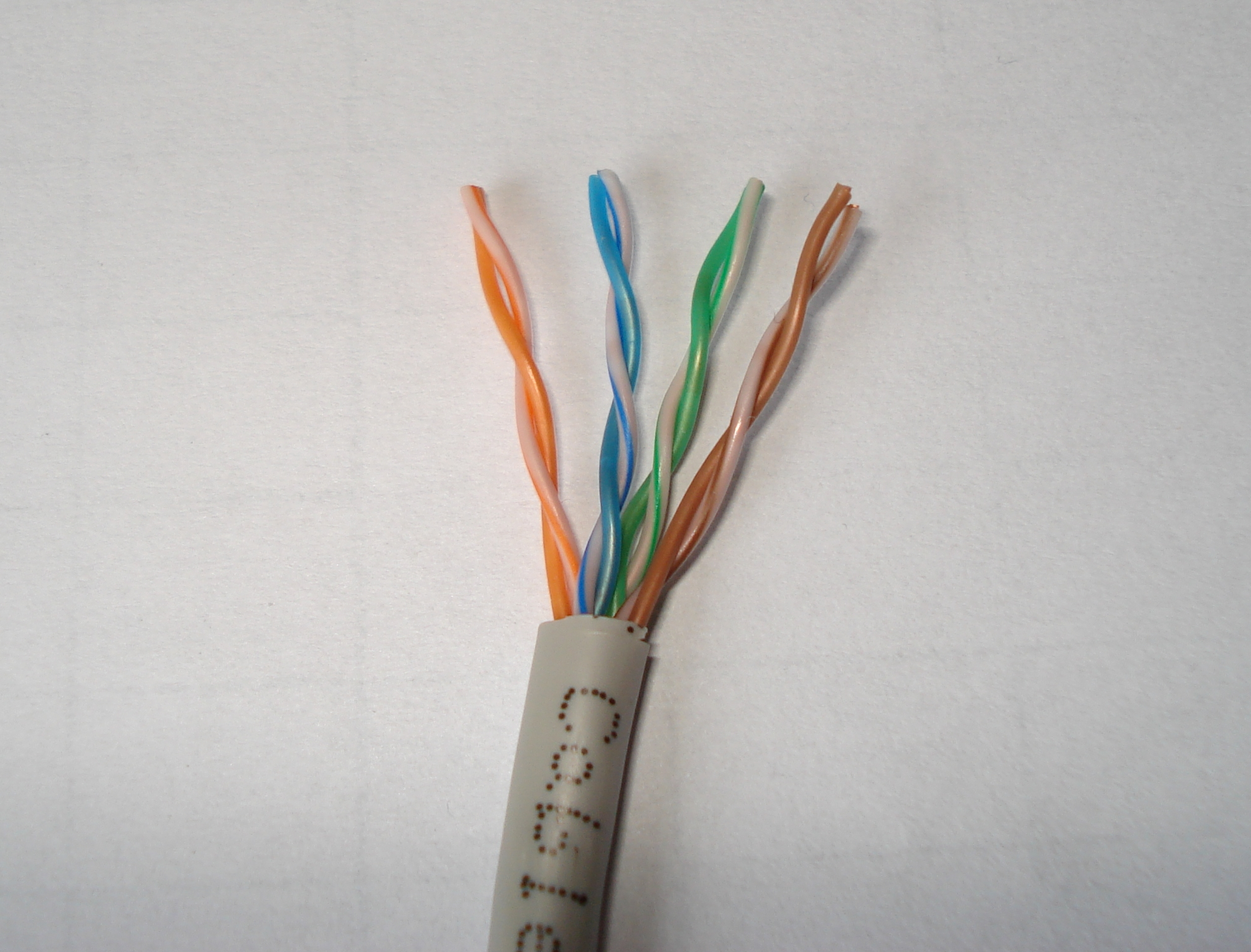 Zdjęcie przedstawia skrętkę nieekranowaną UTP. Autor: Michał Klimek. Data: 07.02.2007.